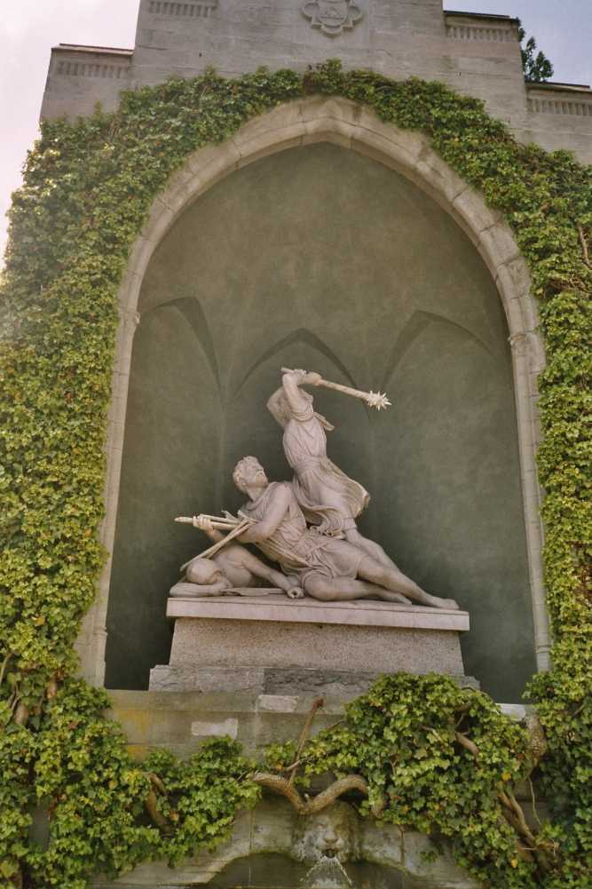 Das Denkmal von Arnold Winkelried in Stans, eigenes Bild, GNU FDL